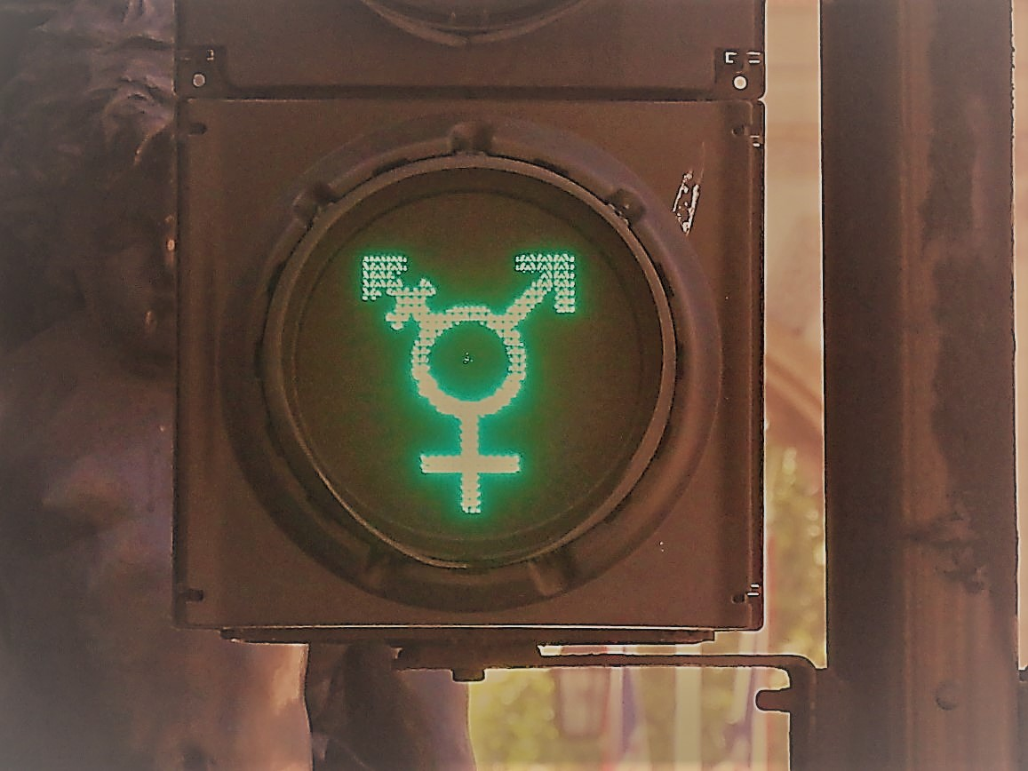 Zeichen für sexuelle Diversität auf grünem Ampelzeichen, London, Nähe Trafalgar Square